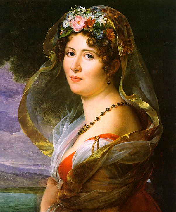 Konstancja z Ossolińskich Łubieńska